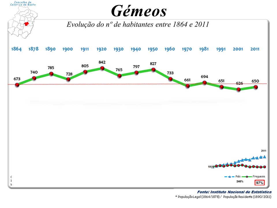 Censos 1864/2011